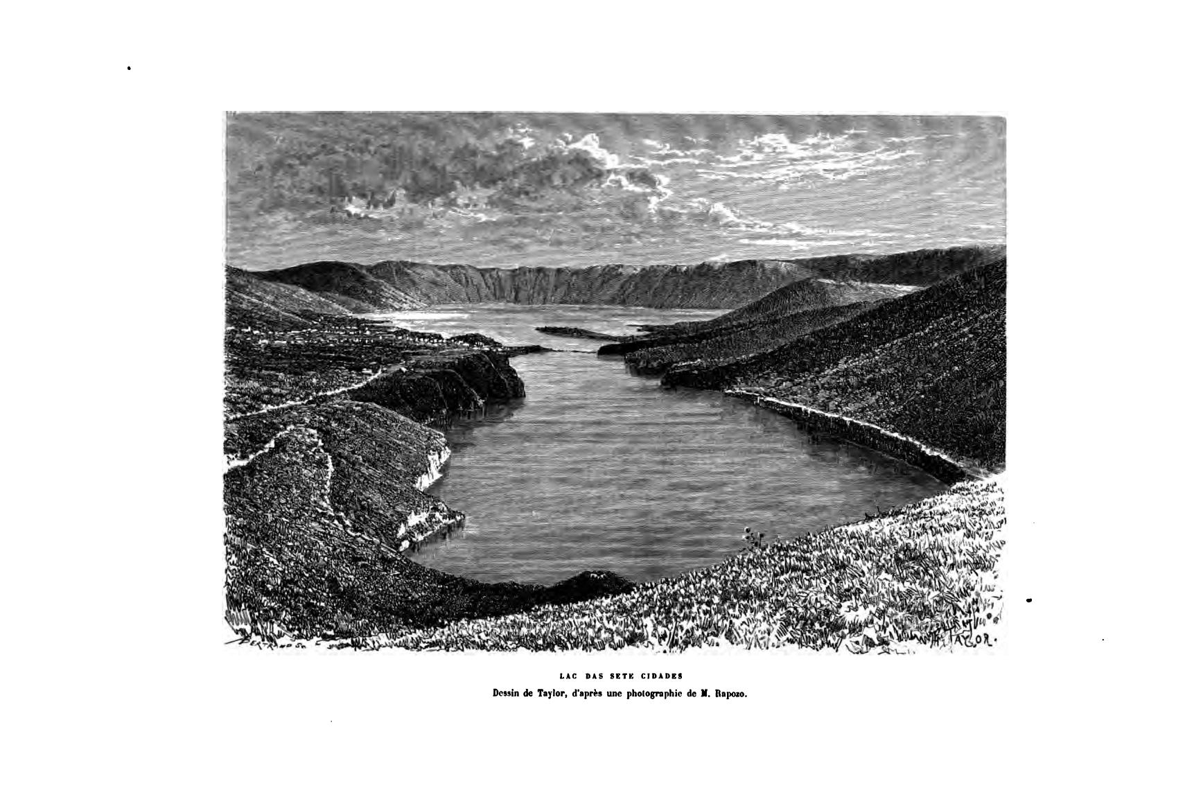 Nouvelle Géographie Universelle, libre XII, p. 47